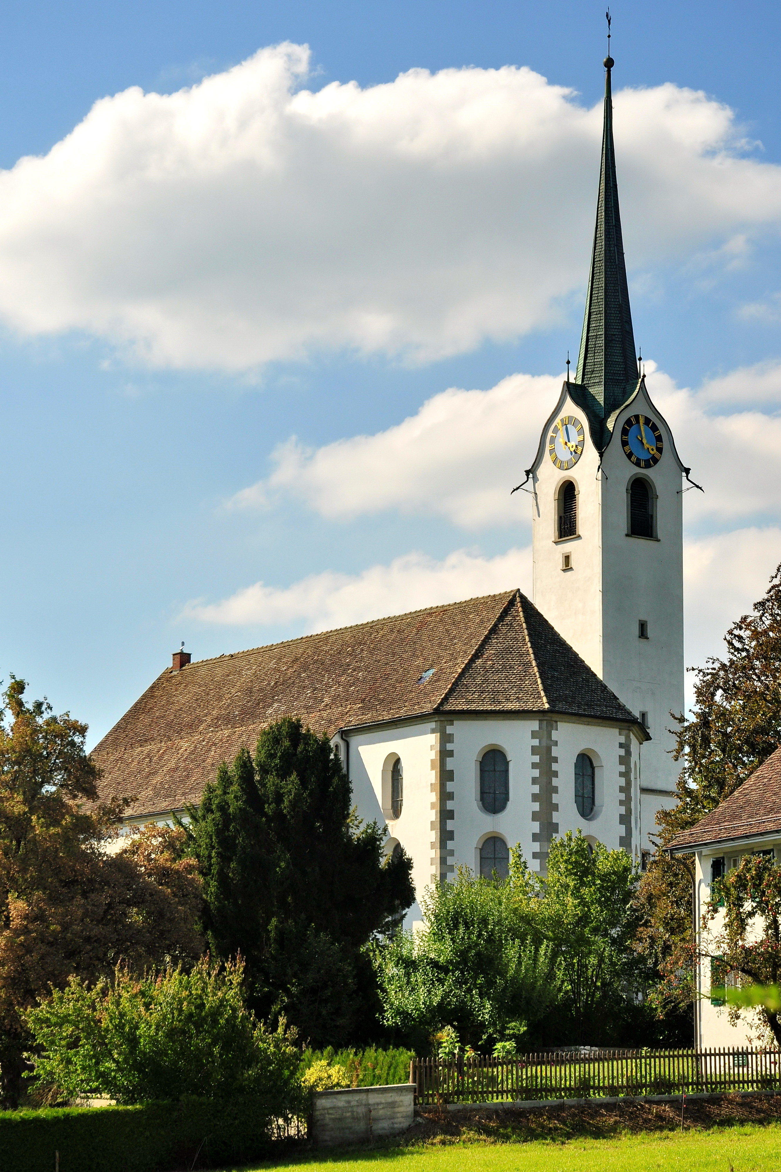 Reformierte Kirche, Oetwilerstrasse in Hombrechtikon (Switzerland)